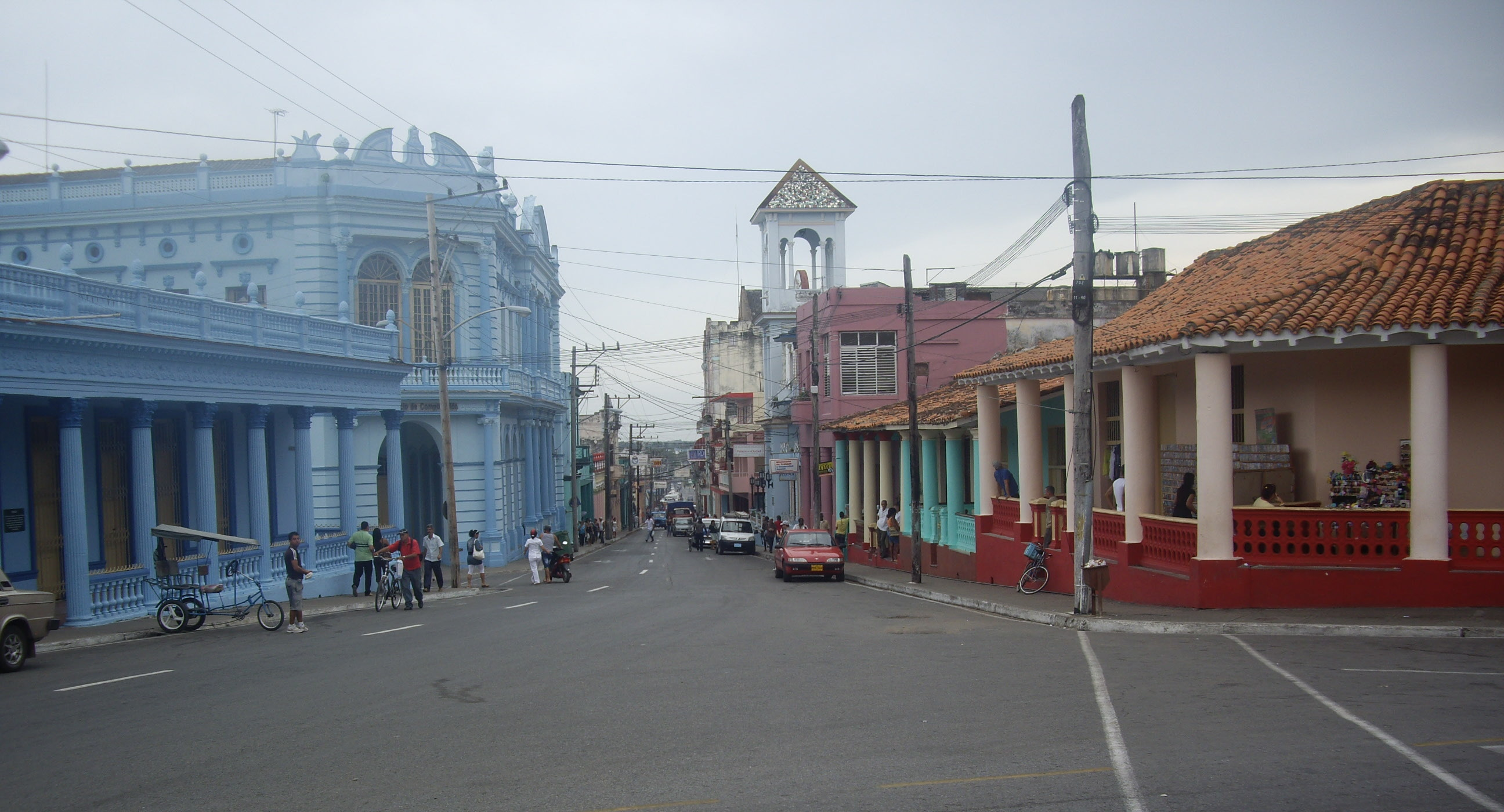 Carrer José Martí des del Parc de la Independència a Pinar del Rio